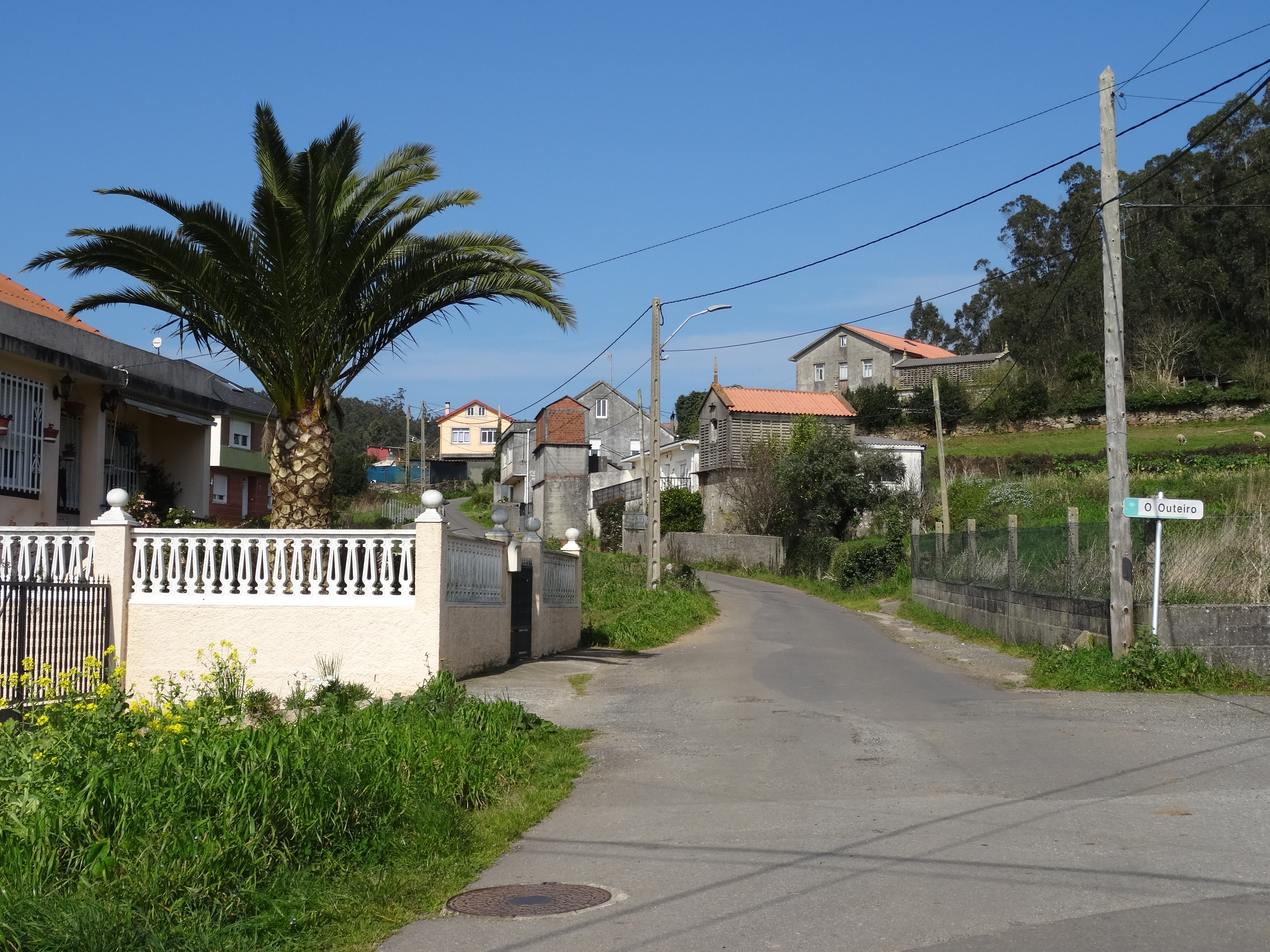 Lugar do Outeiro, parroquia de Oza, Carballo.